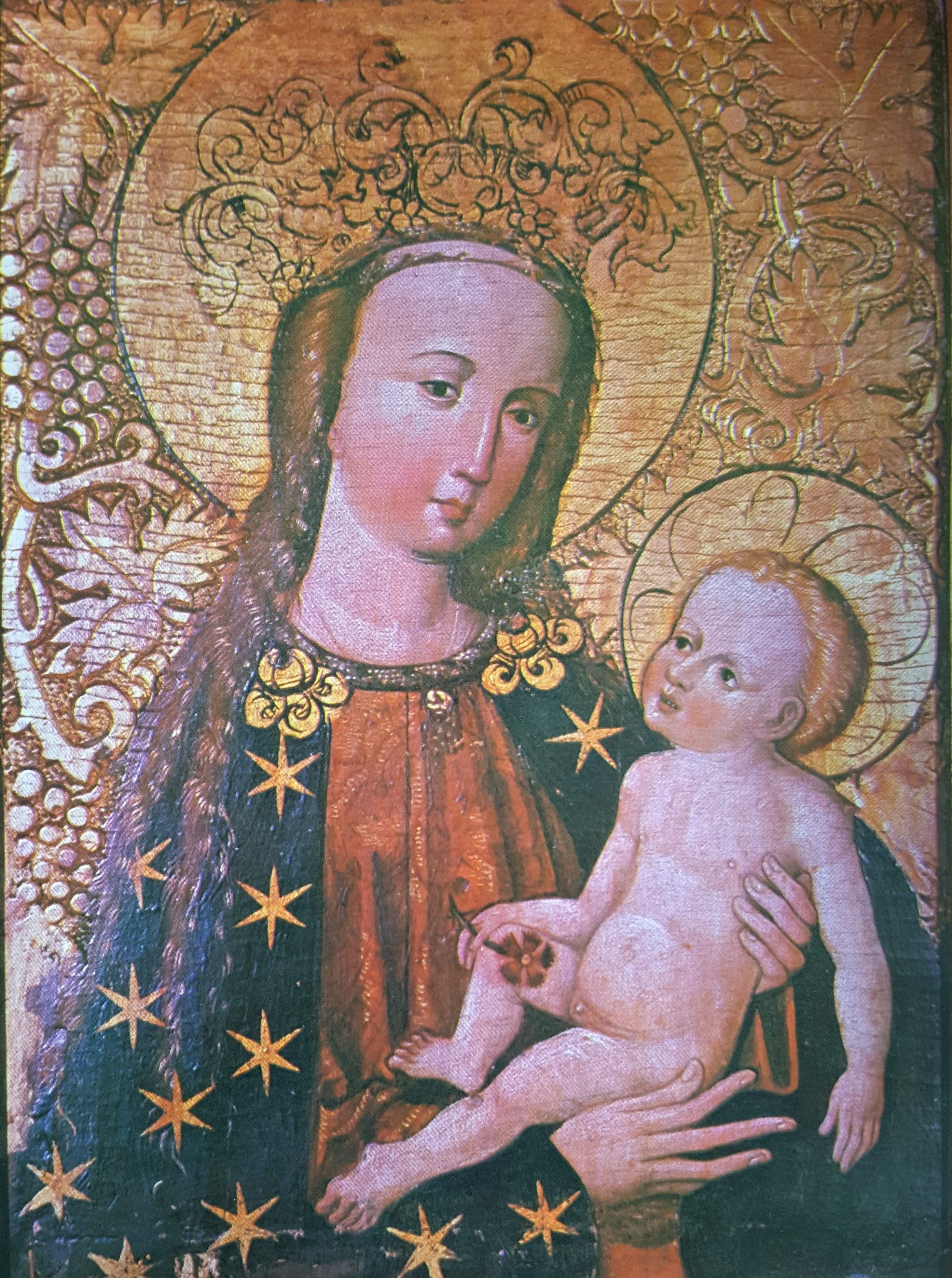 Madonna z goździkiem, Mistrz Zwiastowania z Jodłownika, Muzeum Diecezjalne w Tarnowie